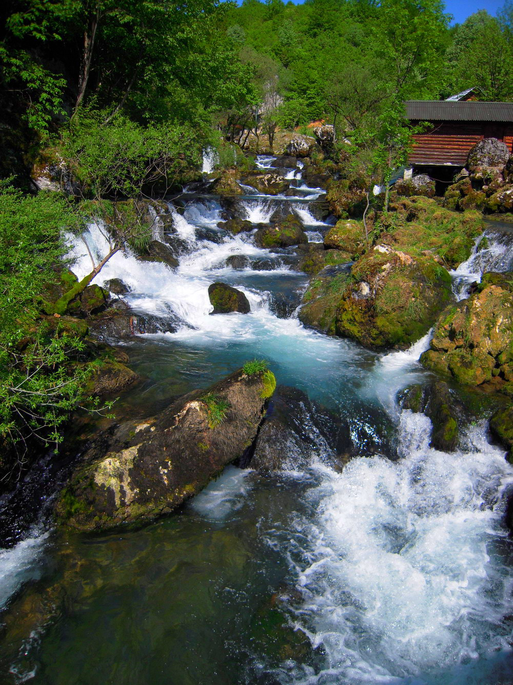 Rijeka Krupa